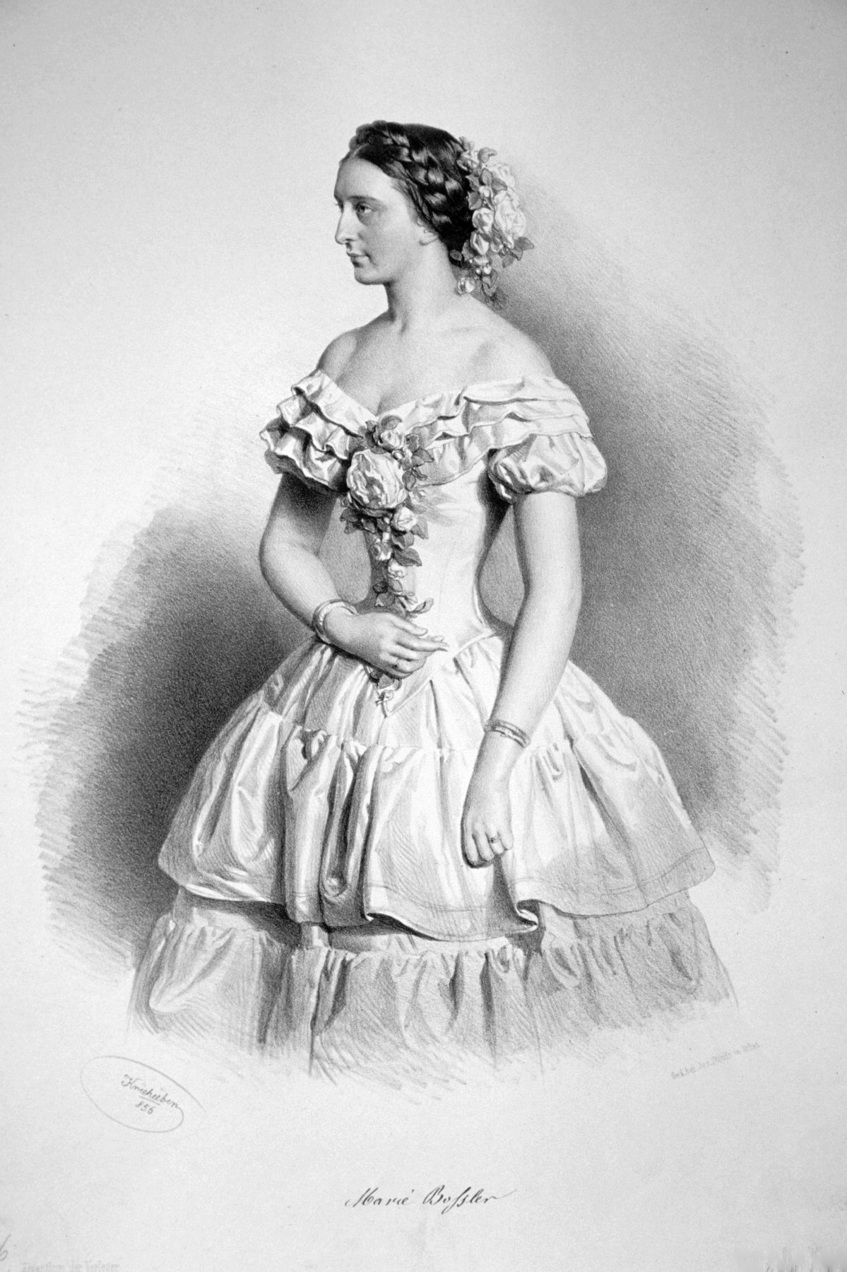 Marie Bossler (1835-1919), deutsche Schauspielerin. Lithographie von Josef Kriehuber, 1856